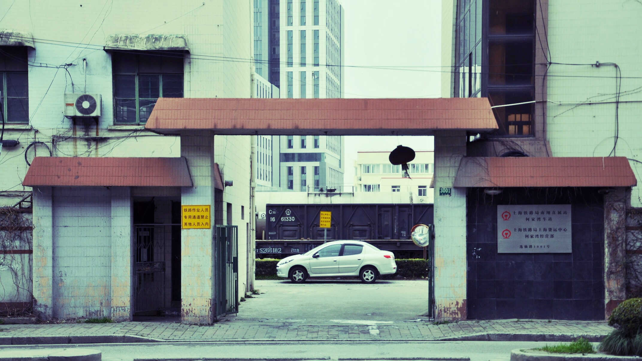 上海铁路局南翔直属站 何家湾车站 逸仙路3001号